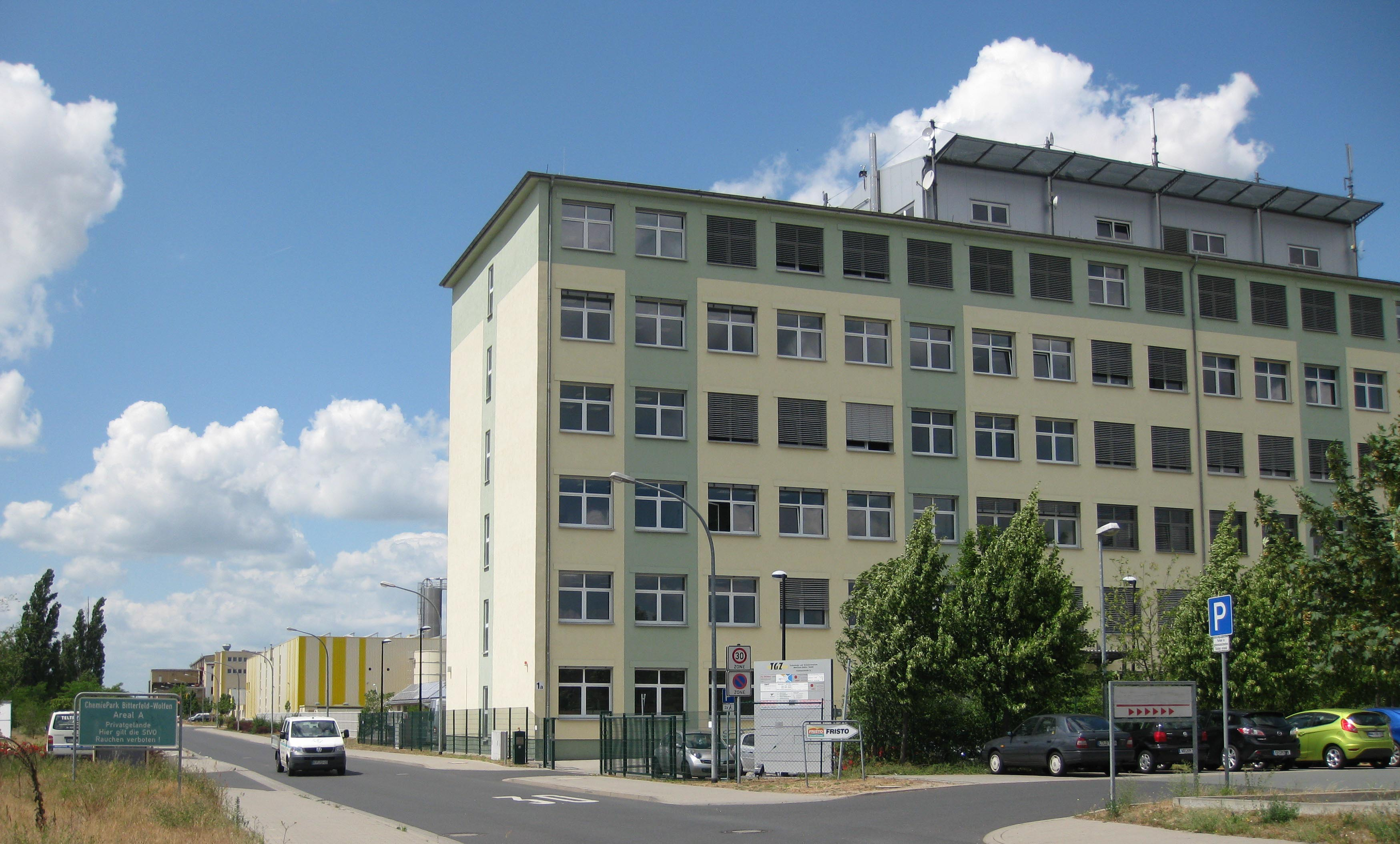 Gebäude des Technologie- und Gründerzentrums in der Andresenstrasse